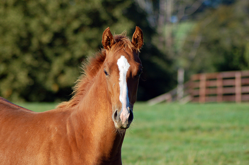 horse